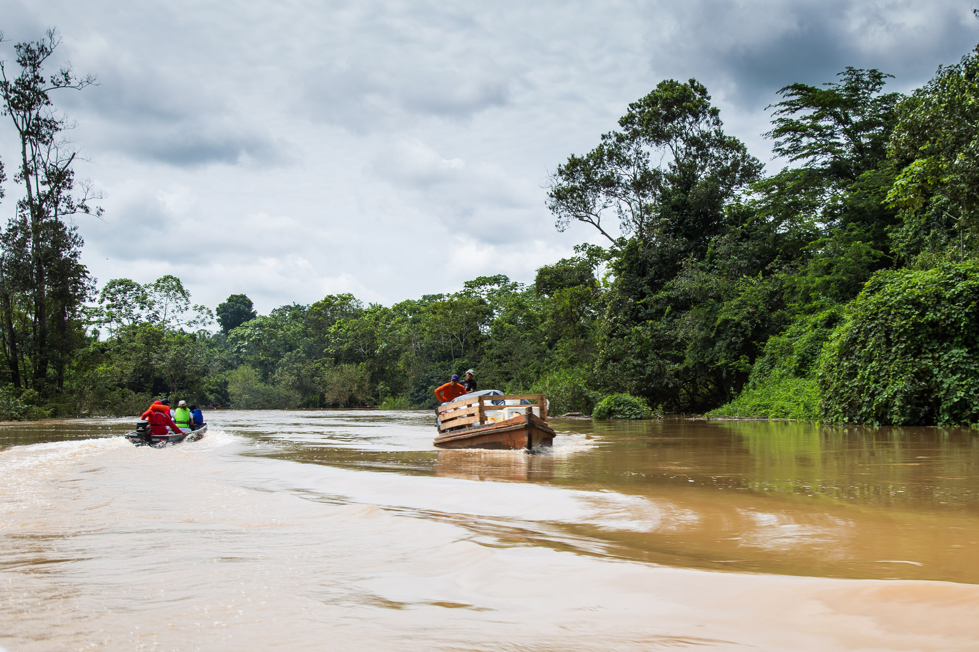 Fotos: Arison Jardim/Secom